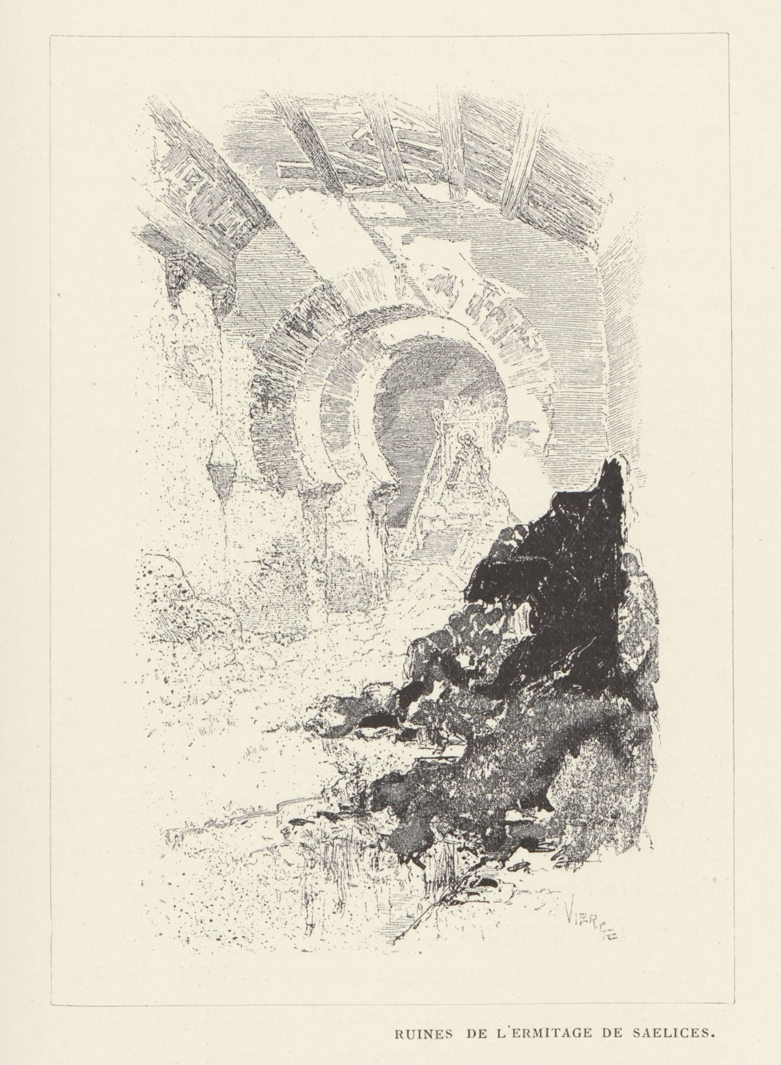 Ruines de l'ermitage de Saelices.